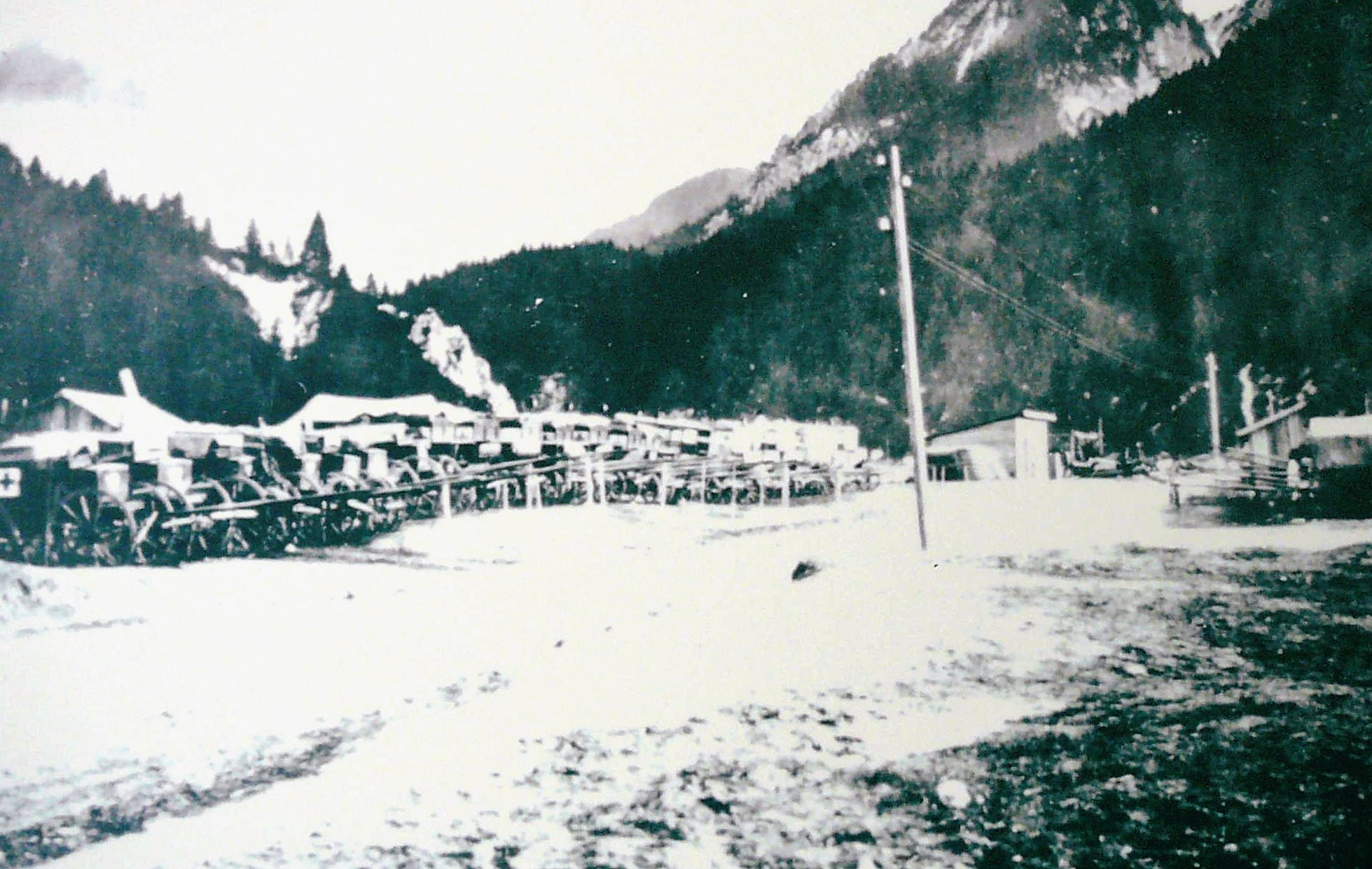 Ospedale militare da campo apresso Nasswand, in Val di Landro. Oggi, dove sorge il cimitero ddi guerra